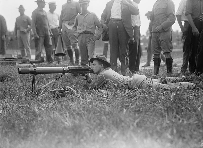 Một người lính tập huấn với súng máy Lewis